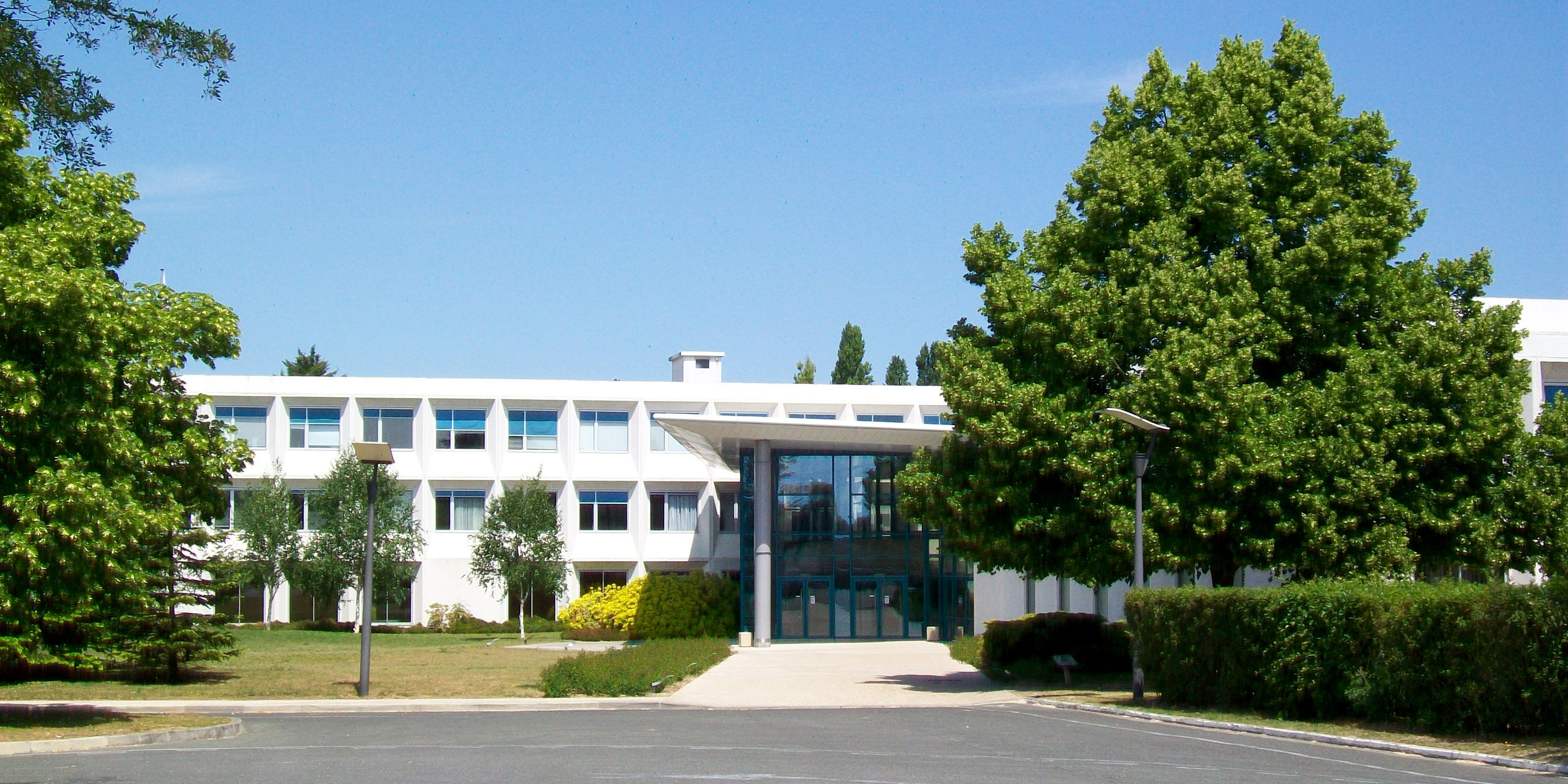 Le CETIM, avenue Félix-Louat.